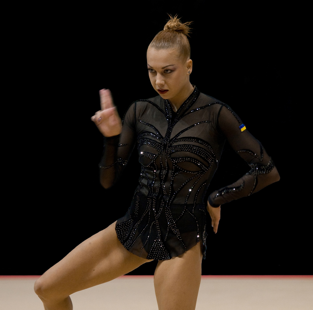 Natalia Godunko en la Final de la VII Copa del Mundo (Benidorm ESP)